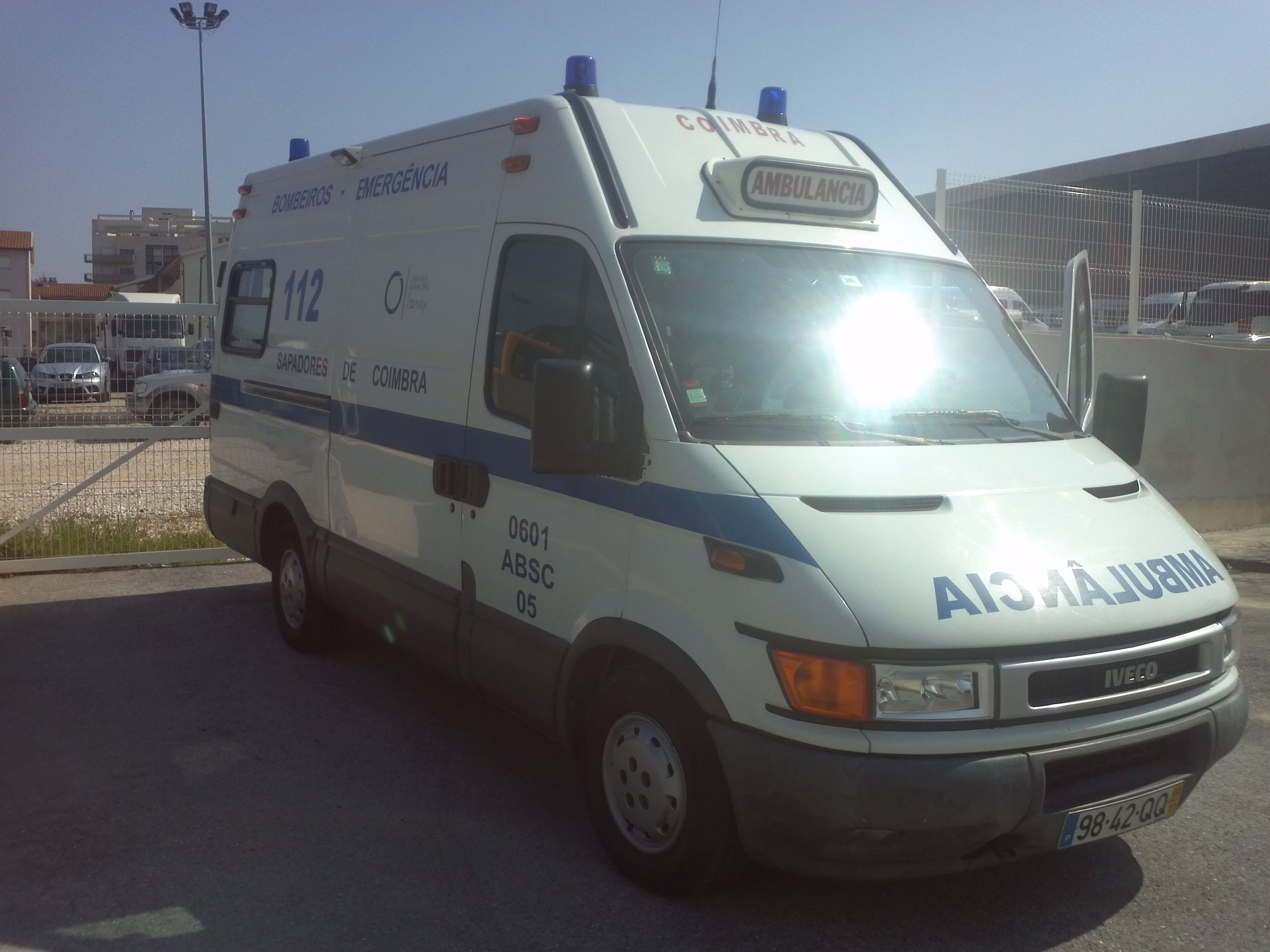 Ambulância de Socorro 05